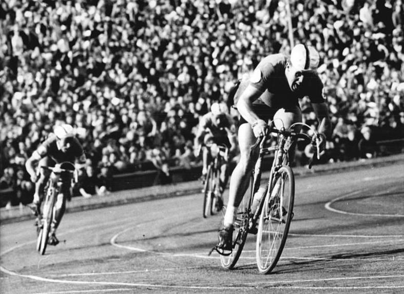 Friedensfahrt, Dresden, Zieleinfahrt Zentralbild Wendorf Zas-Schä 14.5.1960 - XIII. Friedensfahrt - 11. Etappe. Am 14.5.1960 von Dresden nach Leipzig über 201 km, wurde gewonnen von Hagen (DDR). Ihm folgten 3 weitere DDR-Fahrer: Adler, Weissleder und Eckstein. UBz: Die Etappen-Sieger in der Zielkurve. 1. Hagen, 2. Adler, und 3. Weissleder.